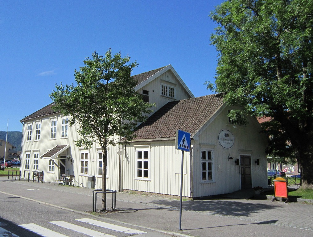 Tidligere stasjonsbygning i Sande sentrum